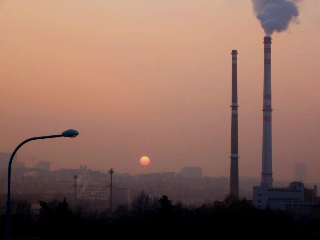 Praha: Pohled z Jižní spojky na Michelskou teplárnu.